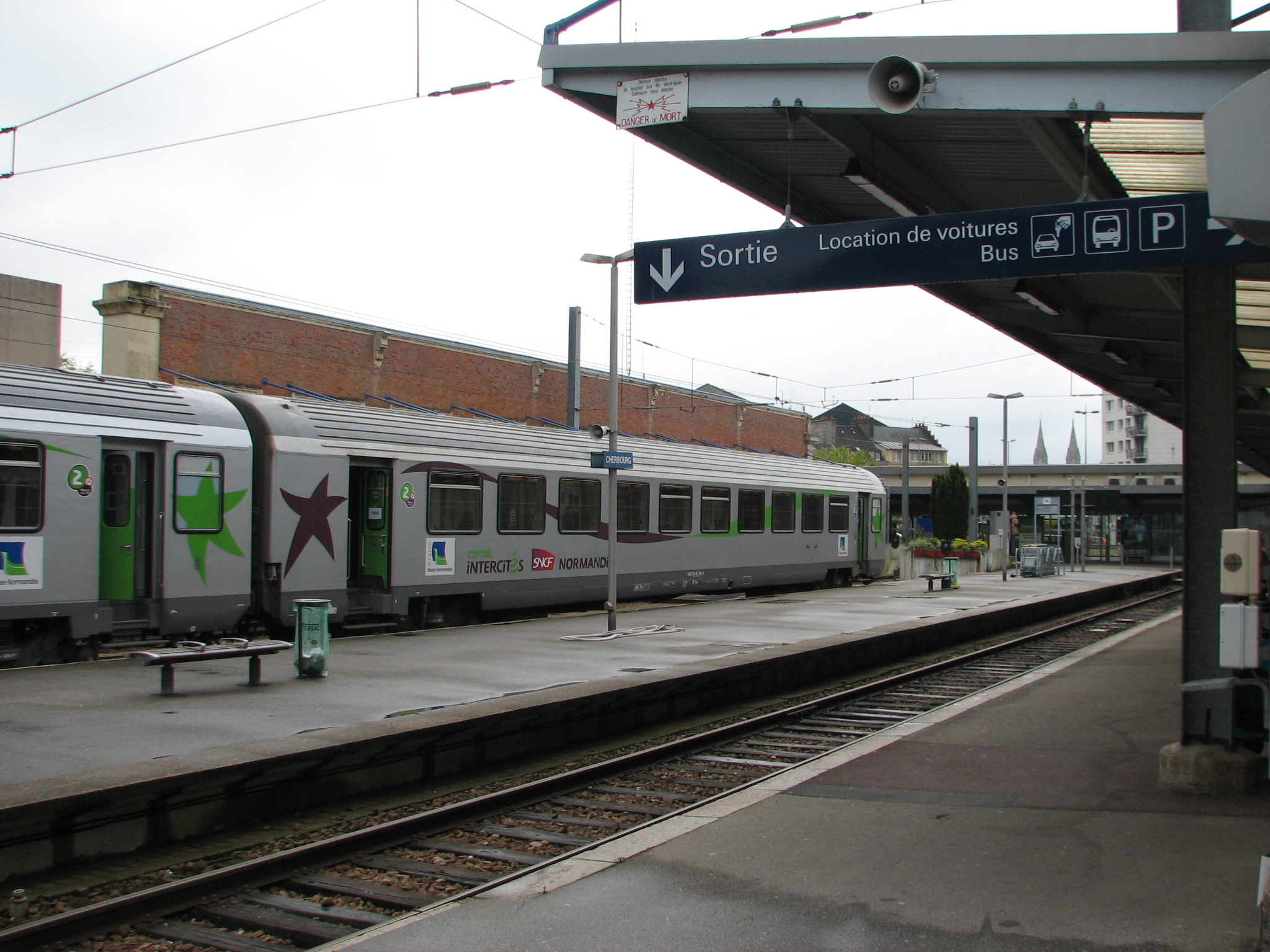 Train Corail Intercité Normandie à la Gare SNCF à Cherbourg